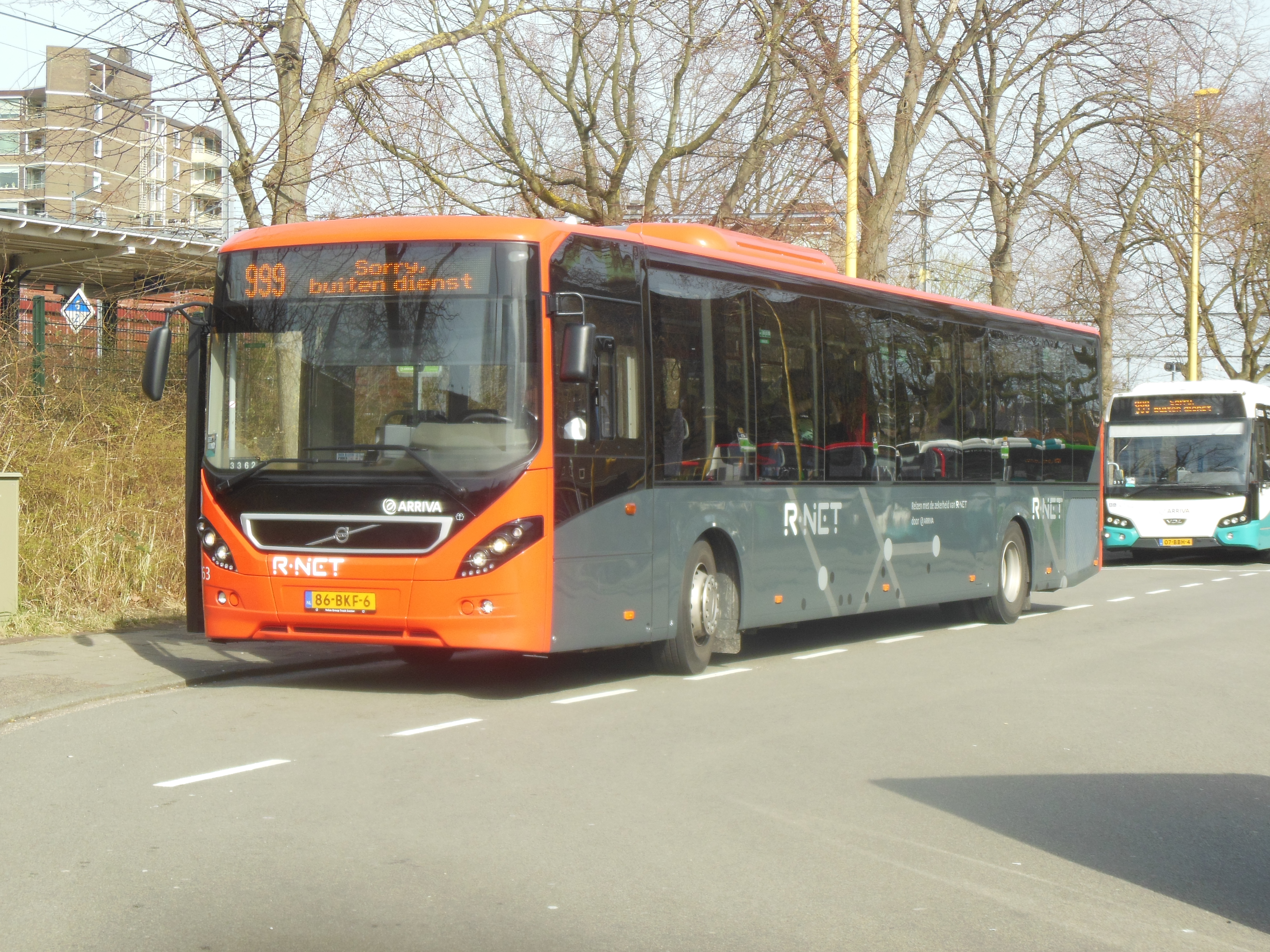 Volvo 8900 7763 van Arriva staat in Gouda.